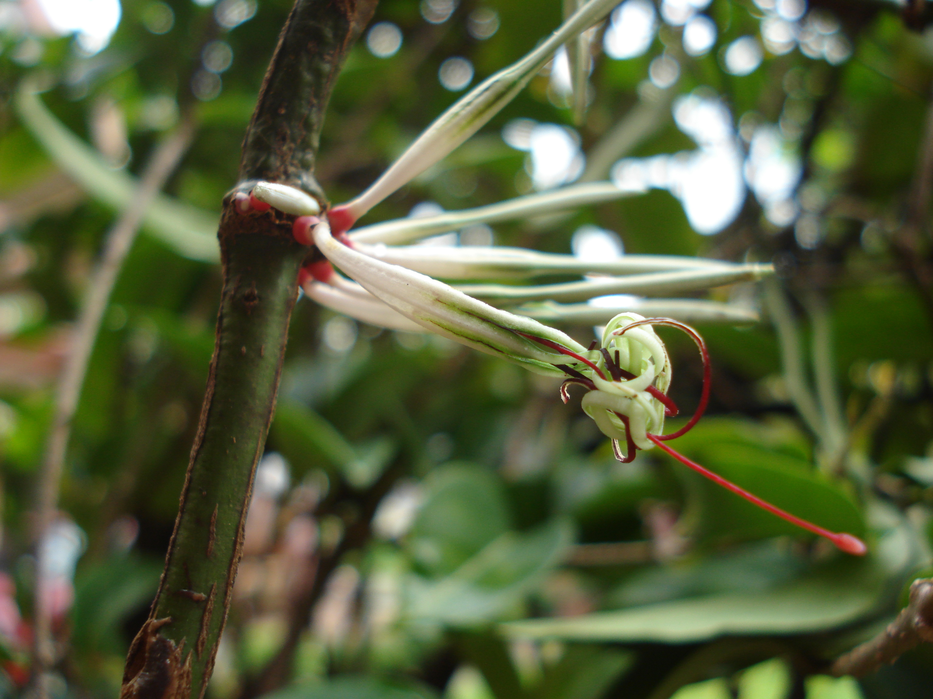 ഇത്തികണ്ണി